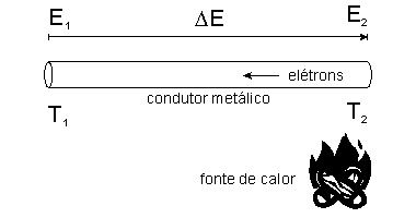 Esquema do Princípio Físico da Termoeletricidade num Condutor Metálico